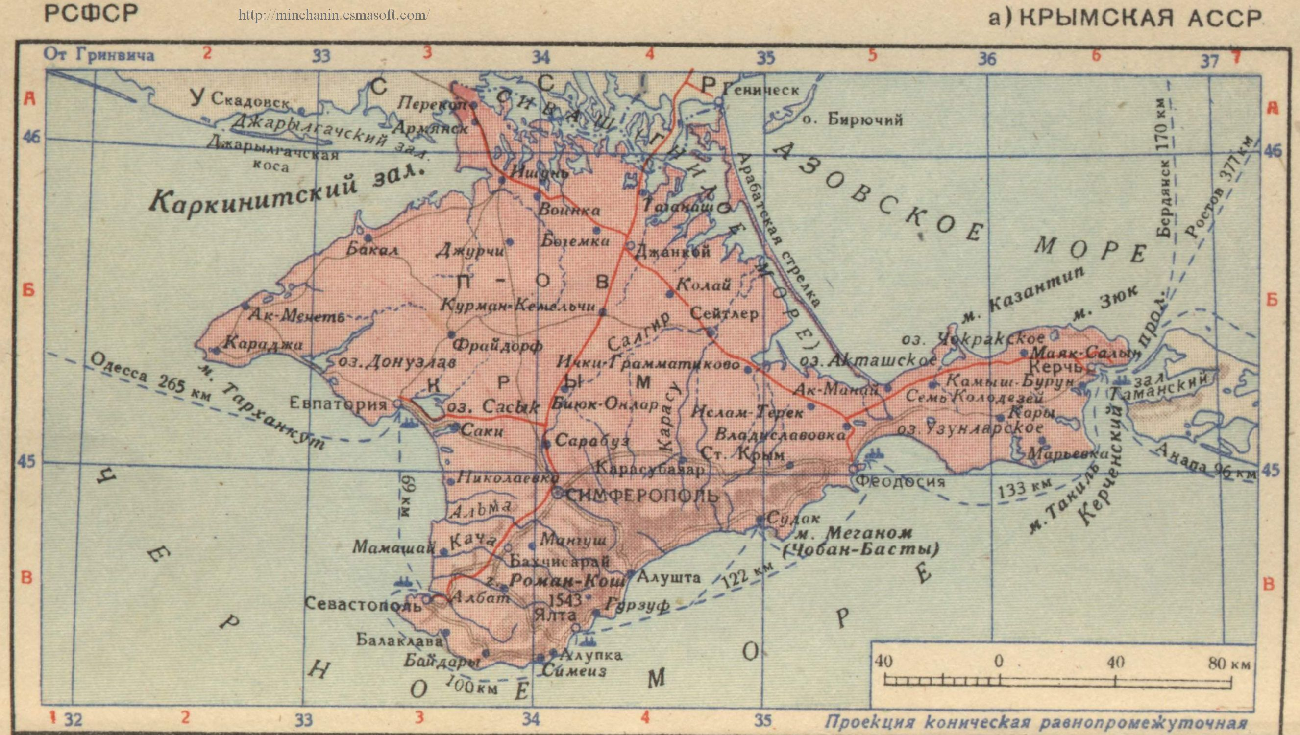 Карта Крымской АССР (РСФСР)